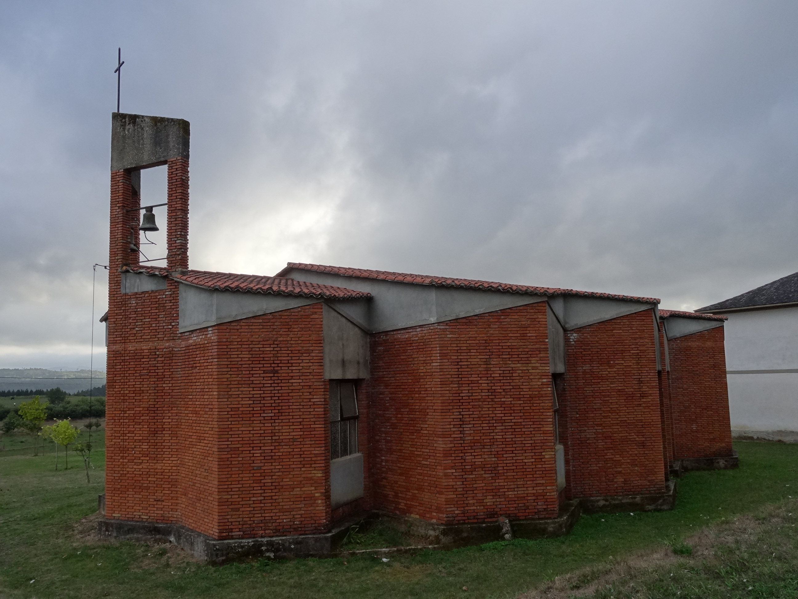 Igrexa de Ribadulla no concello de Santiso, provincia da Coruña.